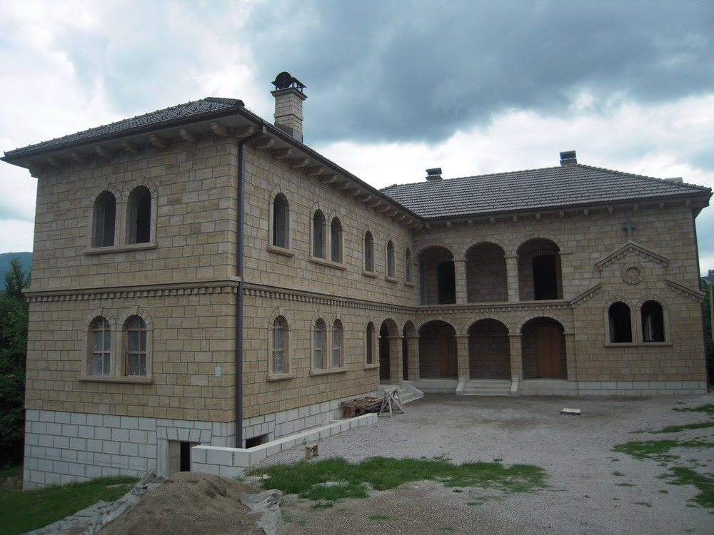 Manastirski_konak_(Krupa_na_Vrbasu)